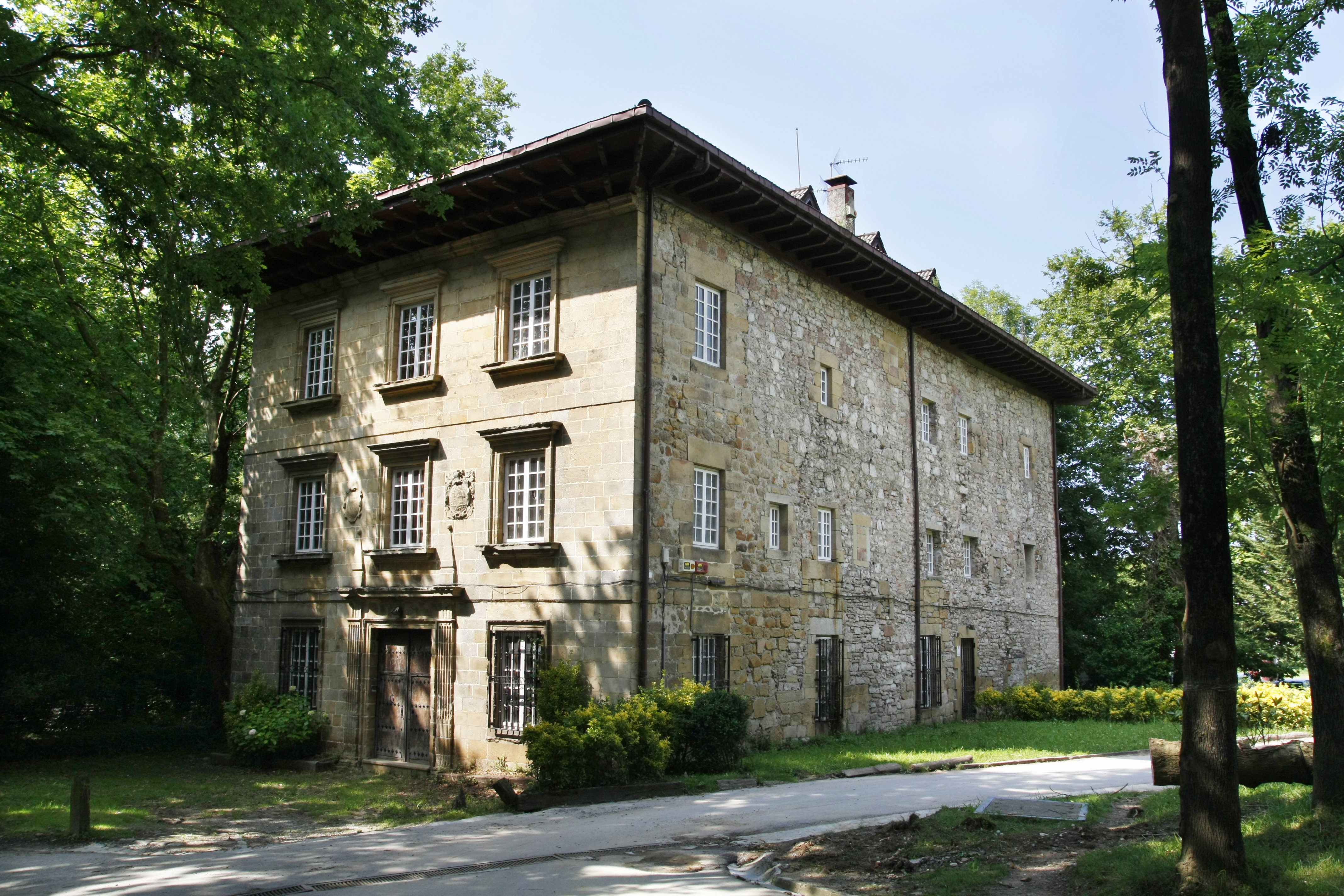 Urdanibia jauregia - Irun